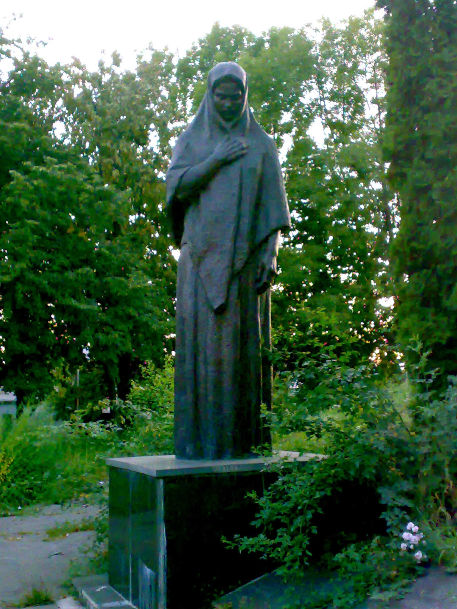 Пам'ятник скорбній матері на Пагорбі слави у Білій Церкві